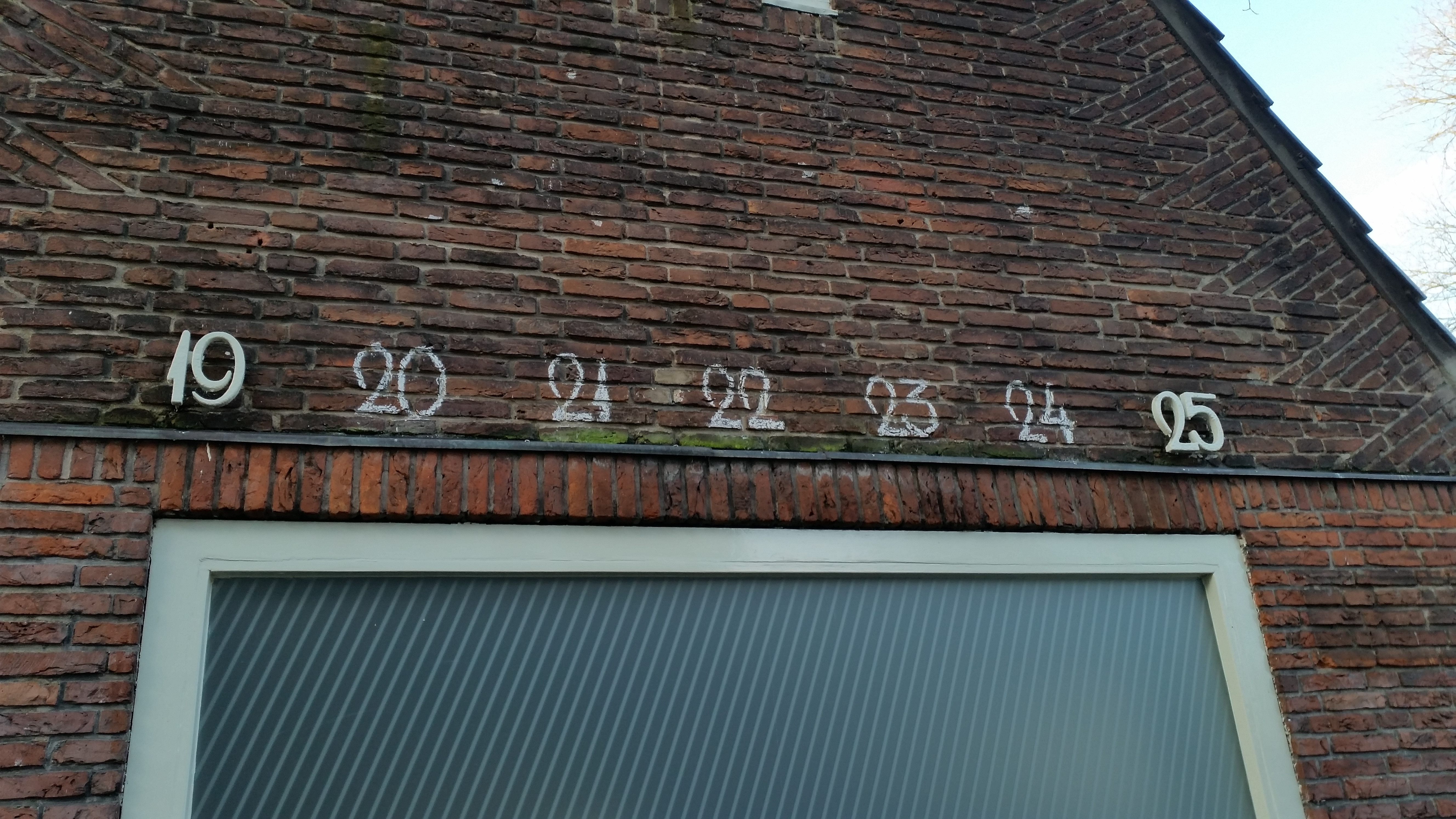 Het gebouw op de hoek Ruysdaelkade, Stadhouderskade, Amsterdam-Zuid werd op de grens van 2019/2020 voorzien van een humoristisch kunstwerkje door Street Art Frankey. Het gebouw droeg het jaartal 1925; tussen "19" en "25" was voor de kunstenaar voldoende ruimte om de ontbrekende getallen in te tekenen.